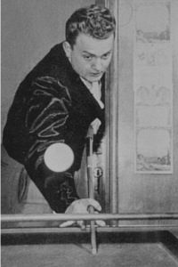 Der belgische Billard Artistique-Spieler Raymond Steylaerts